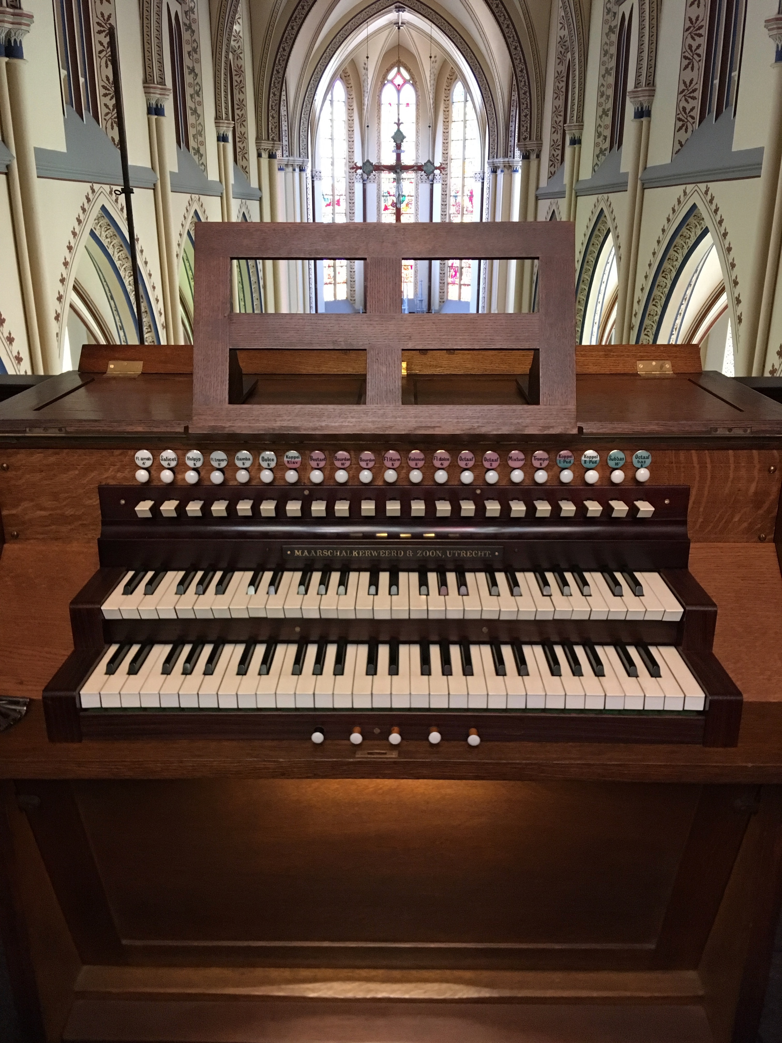 Foto is genomen op 15 mei 2019. Speeltafel van het Maarschalkerweerdorgel uit 1907 in de Pancratiuskerk te 's-Heerenberg